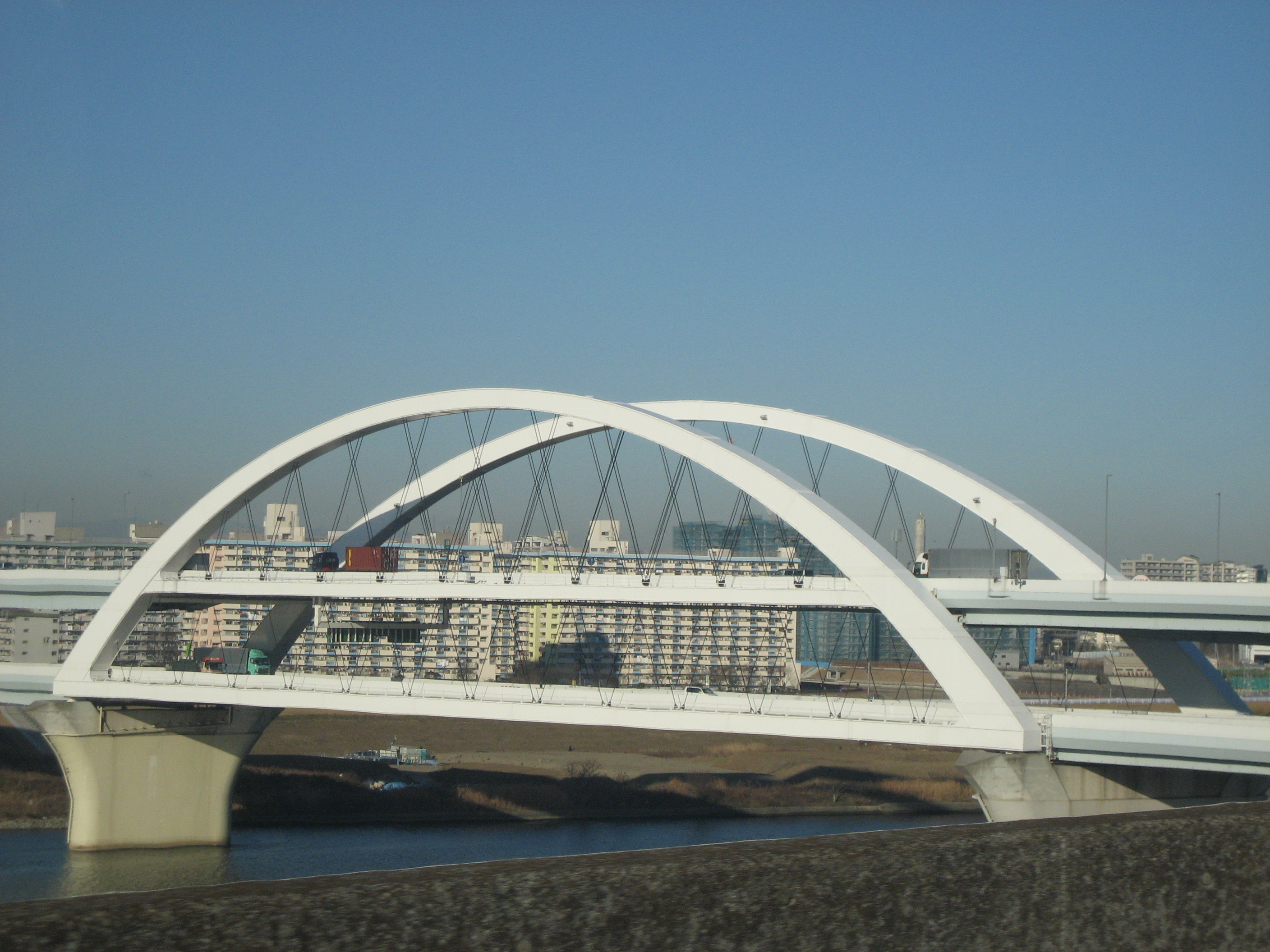 首都高速道路中央環状線五色桜大橋